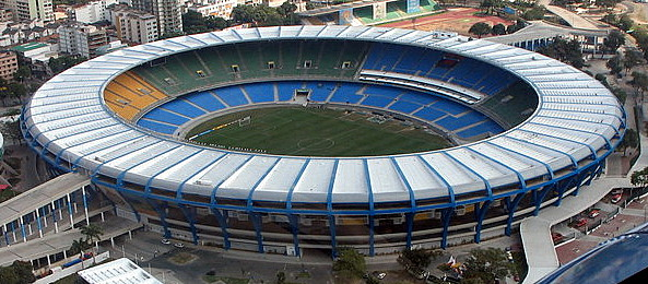 Maracanã visto de cima (imagem modificada para ajustar predefinição da ptwiki)